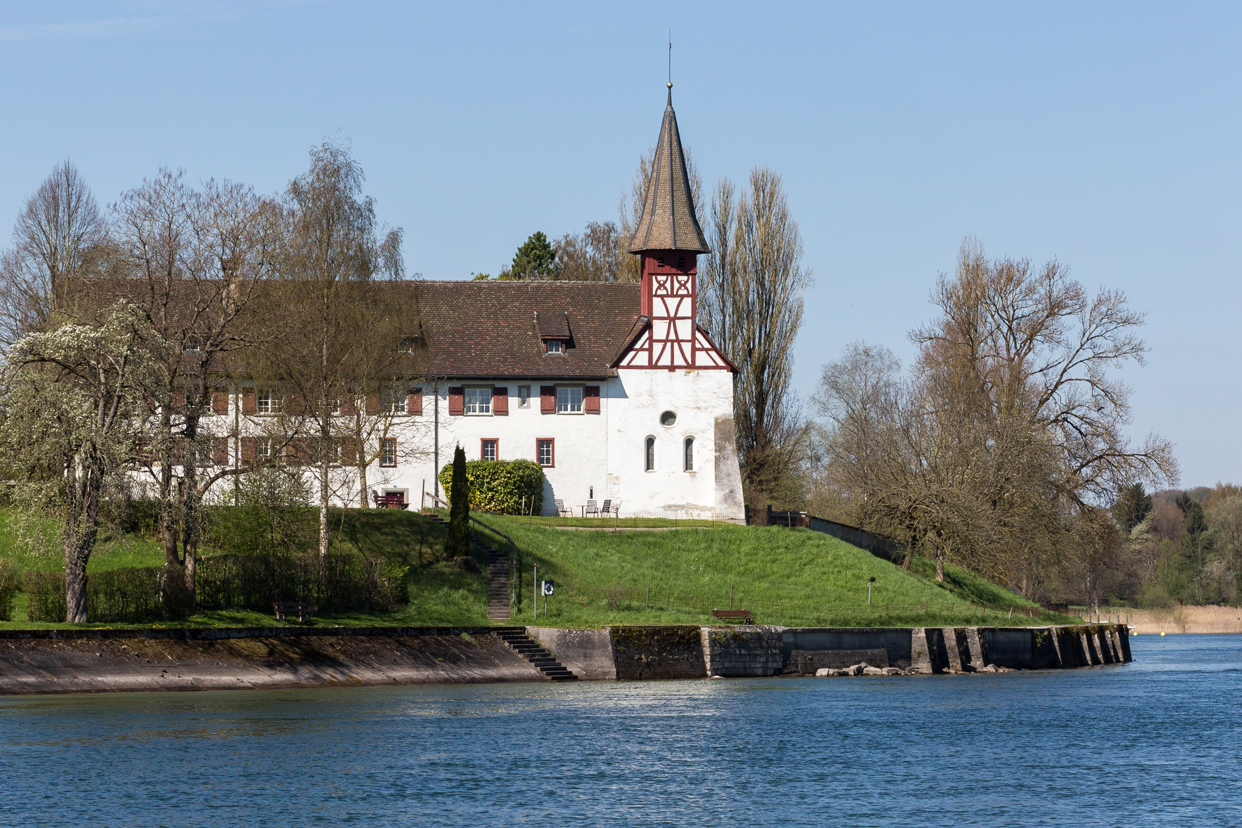 Ehemaliges Benediktinerpriorat Wagenhausen TG